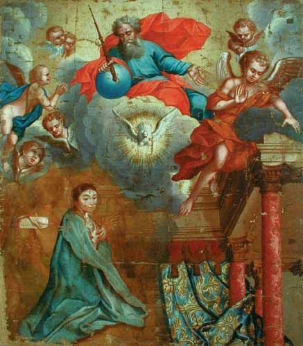 Звеставанне. Другая палова ХVІІІ ст. З в. Купяцічы. Пінскі р-н. Музей старажытна- беларускай культуры НАН Беларусі